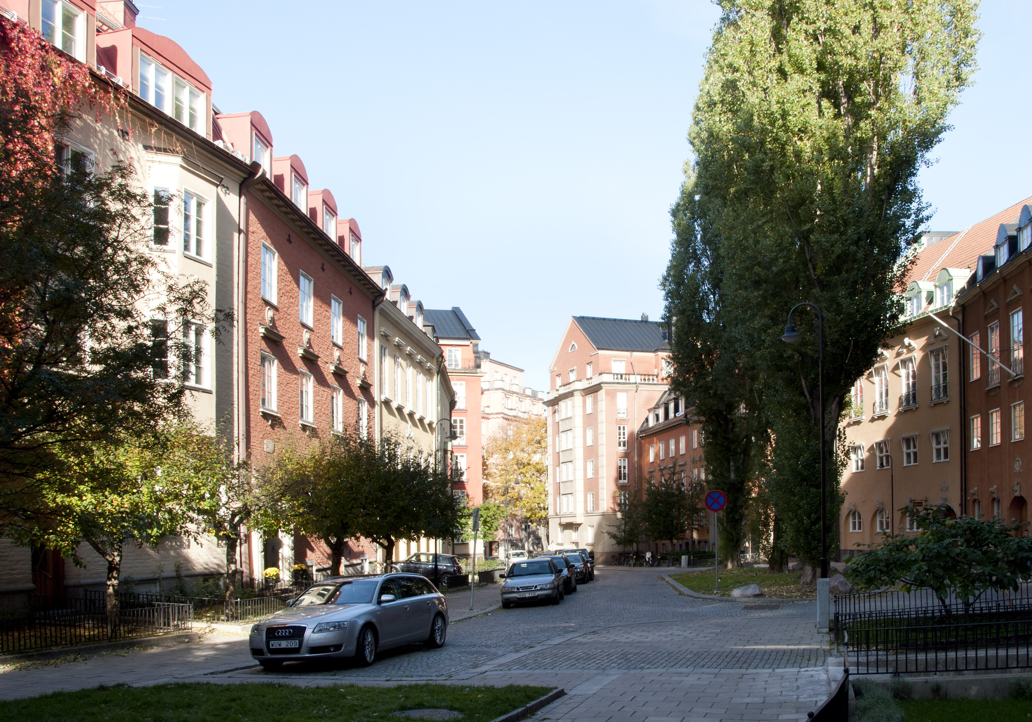 Tysta gatan, Stockholm